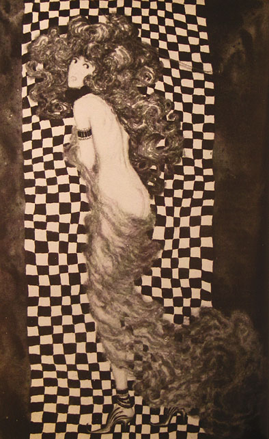 копия работы Н. Калмакова. "Соломея". 1908